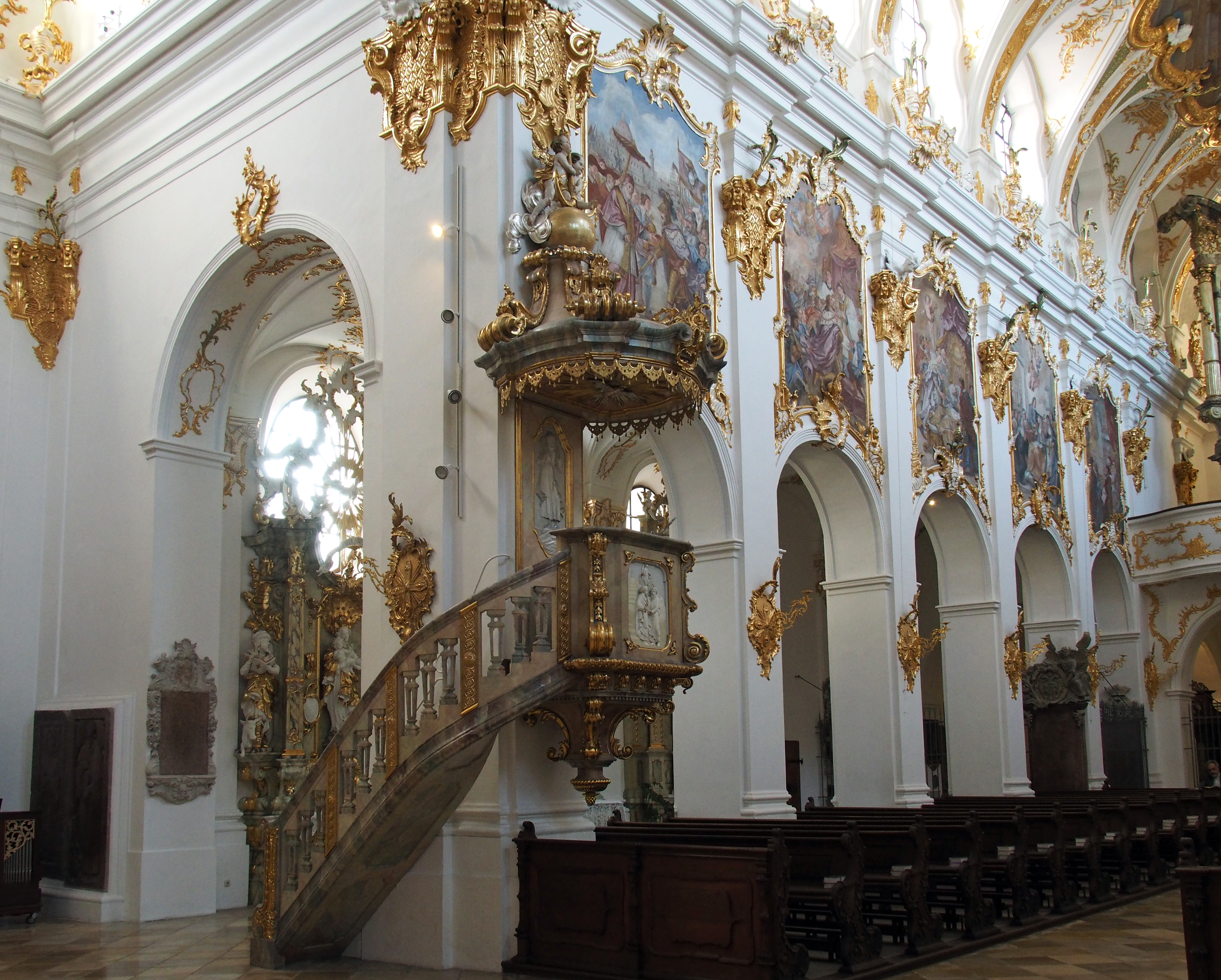 Kirchenschiff und Kanzel in der „Alten Kapelle“ Regensburg